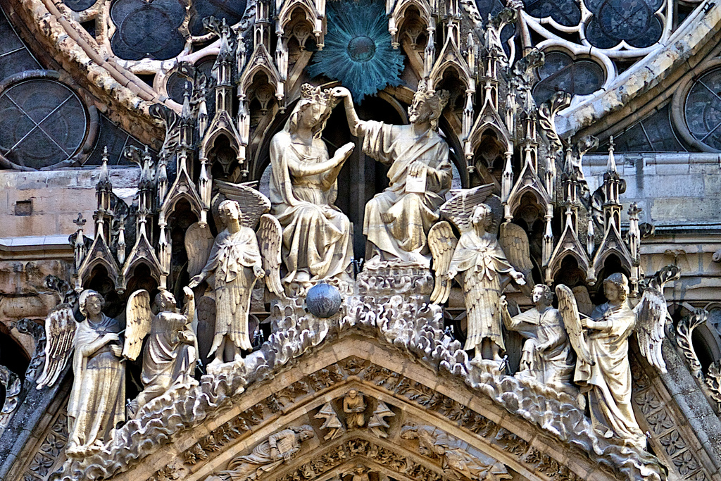 Cathédrale Notre-Dame — Reims, Champagne-Ardenne, France